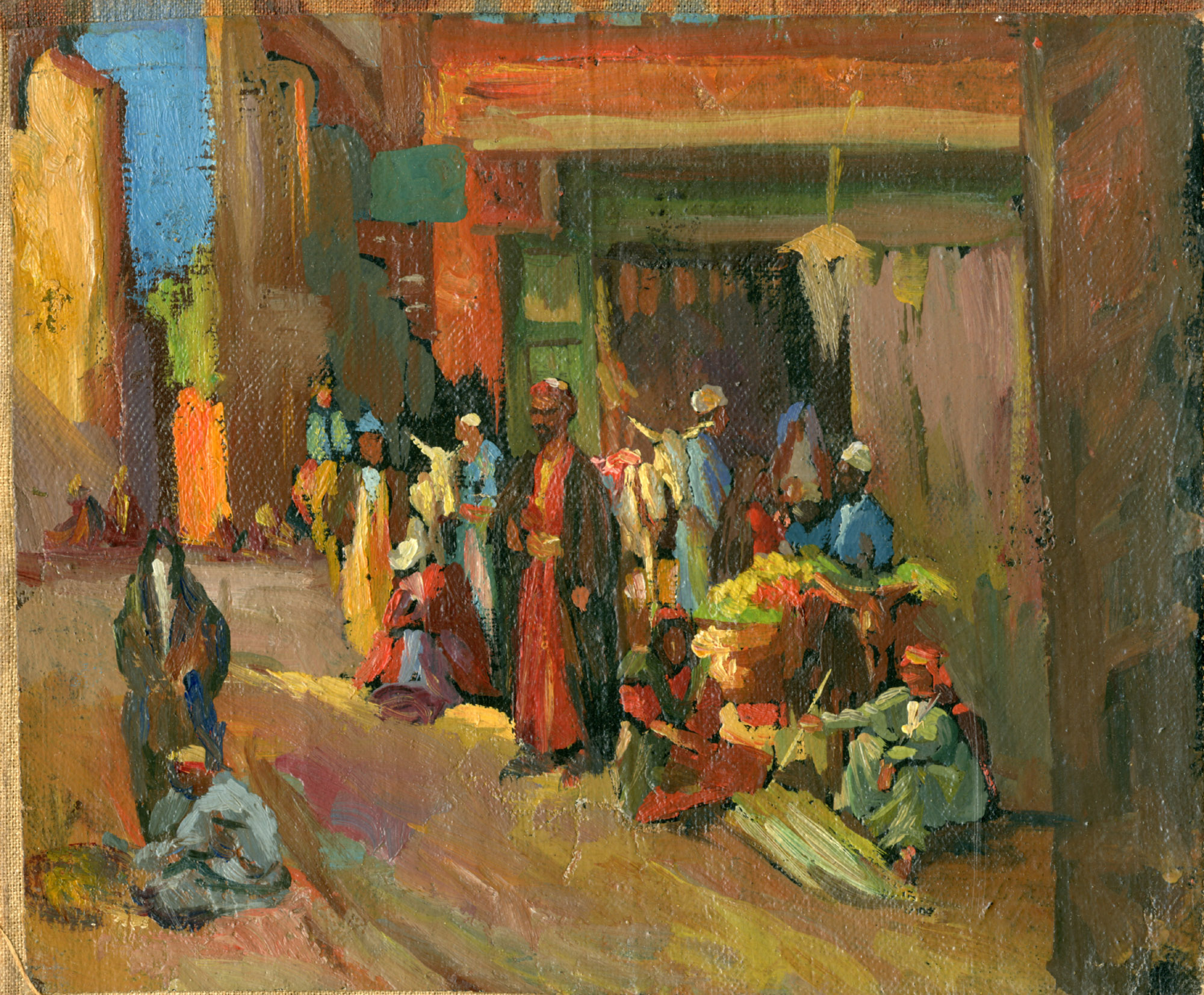 Oleguer Junyent i Sants (Barcelona, 1876 - 1956), Mercat oriental. Roda al món i torna al Born (c. 1908), oli sobre tela, 16,5 x 19 cm, Reial Acadèmia Catalana de Belles Arts de Sant Jordi, inv. 7567.